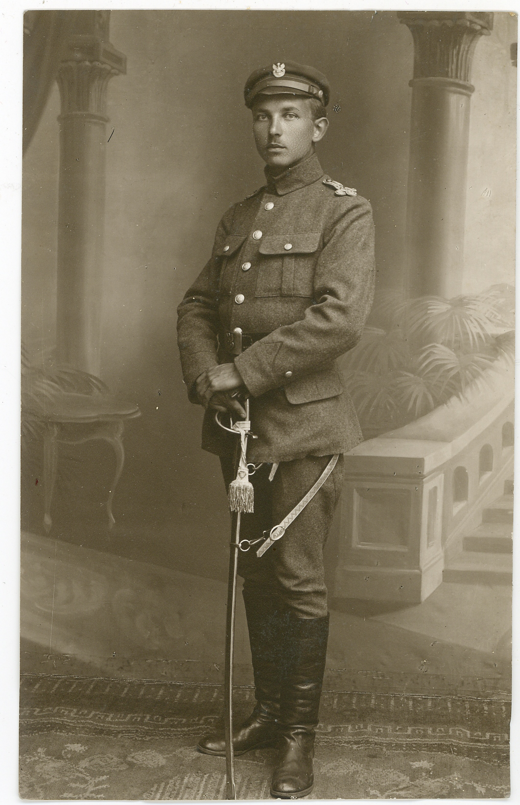 Zalążki 22 p.p.